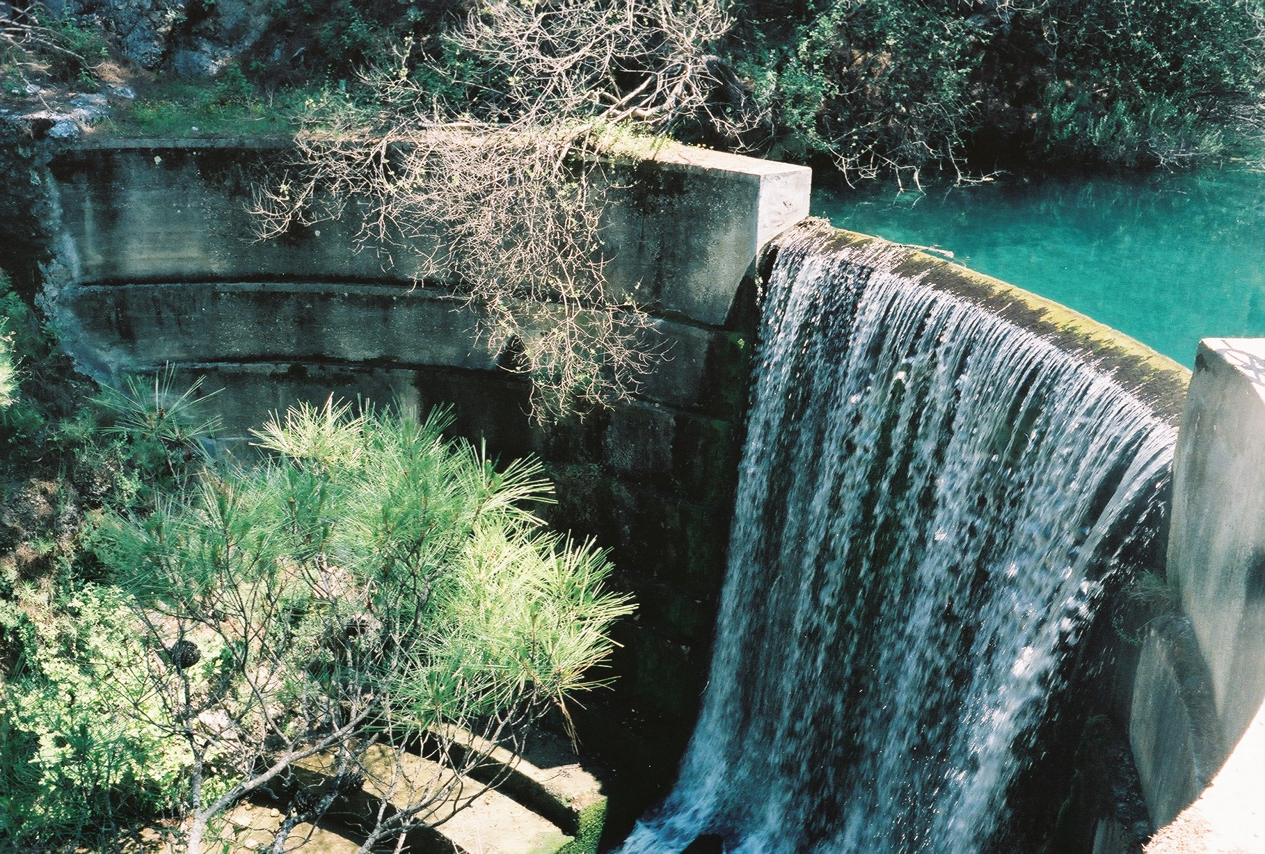 Der Wasserfall von Epta Piges